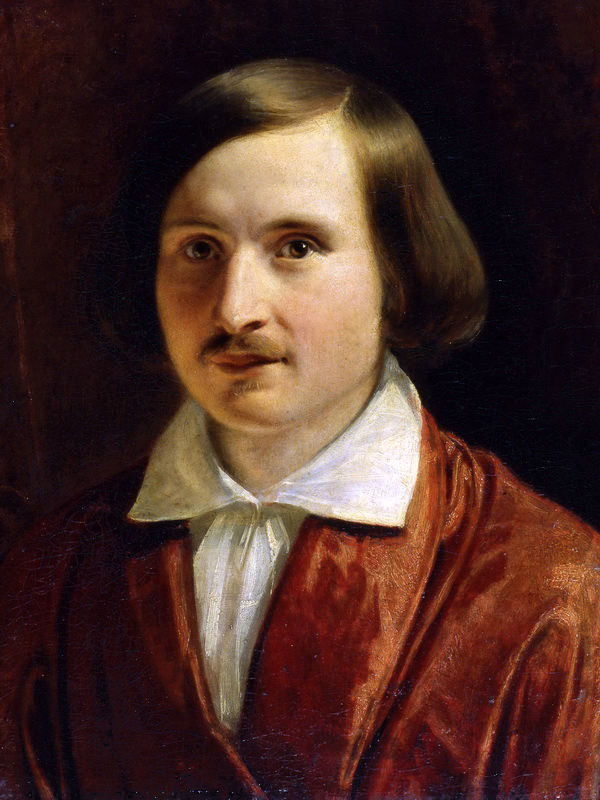 Федор Антонович Моллер (1812–1874) Портрет Н.В. Гоголя. 1840-е гг. Холст, масло.